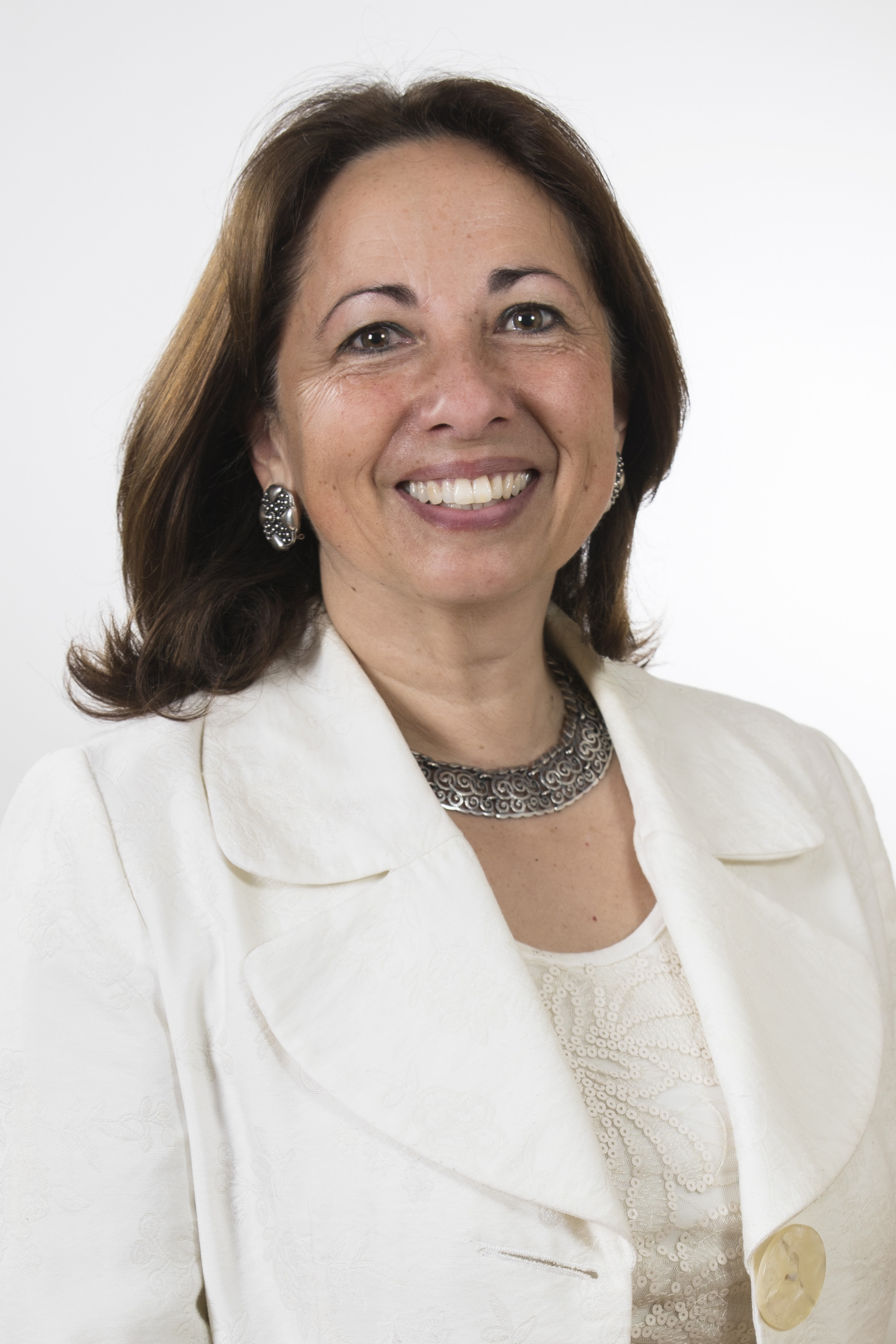 Alejandra Sepúlveda Orbenes en la fotografía oficial de diputados periodo 2018-2022. (Fotos: Christel Andler, René Lescornez, Johanna Zárate)